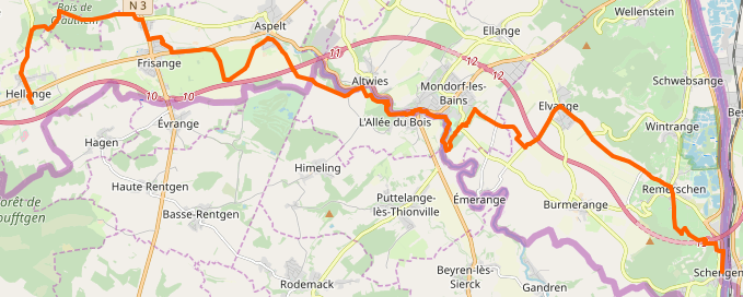 Streck vum Schengen-Helleng-Pad